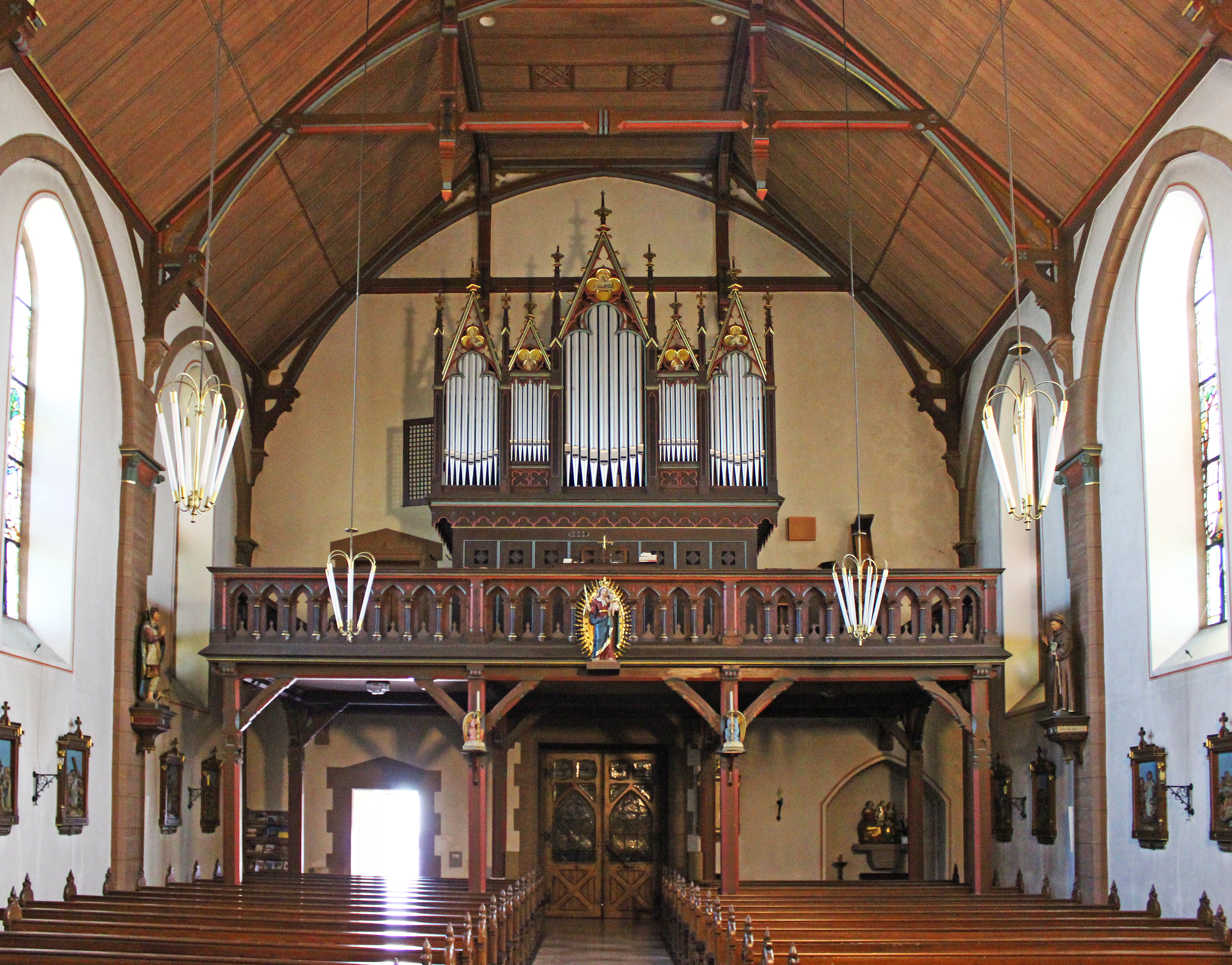 Blick ins Innere der katholischen Pfarrkirche St. Anna in Biesingen, einem Stadtteil von Blieskastel, Saarland